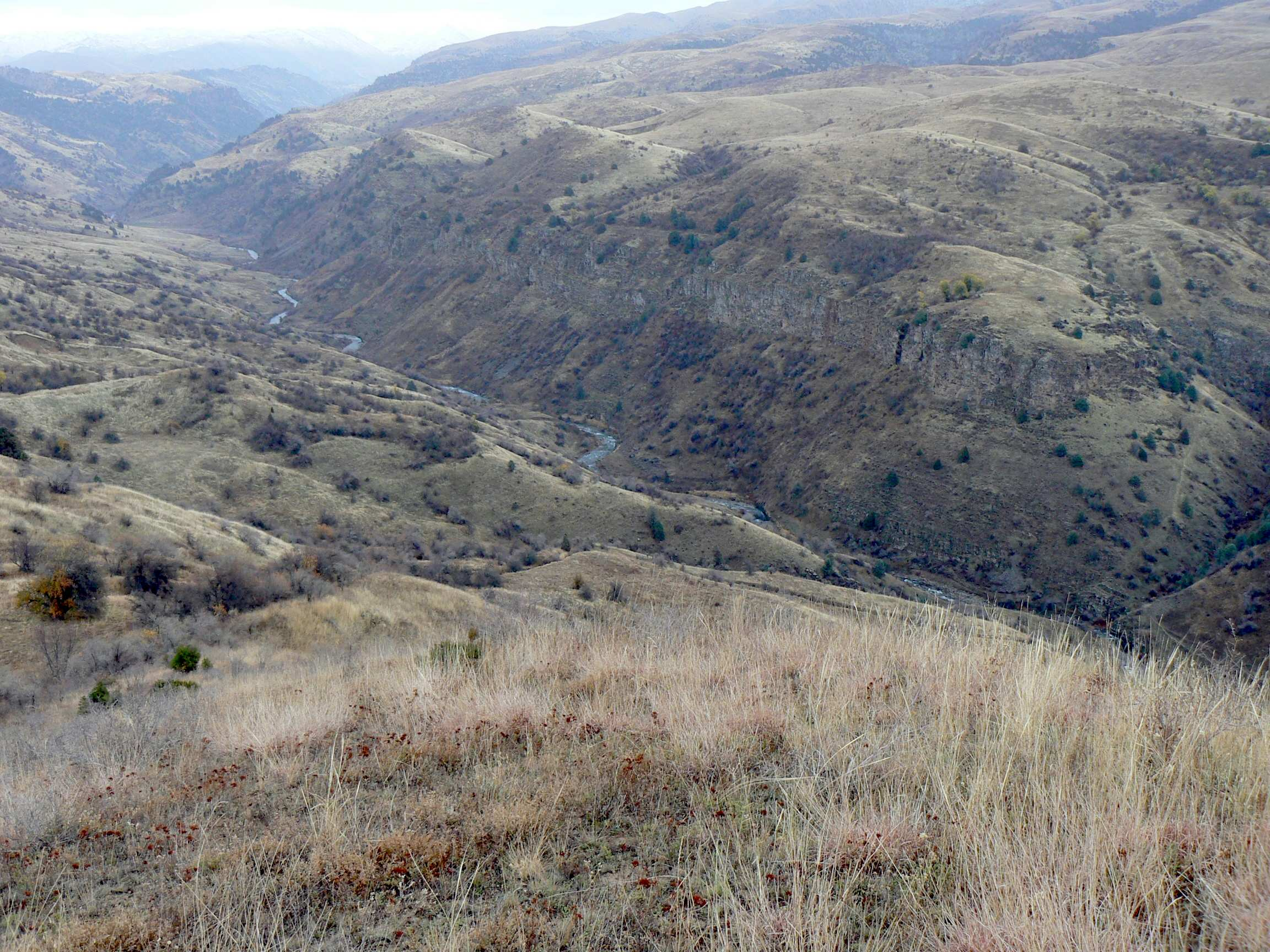 Река Угам выше лесхоза